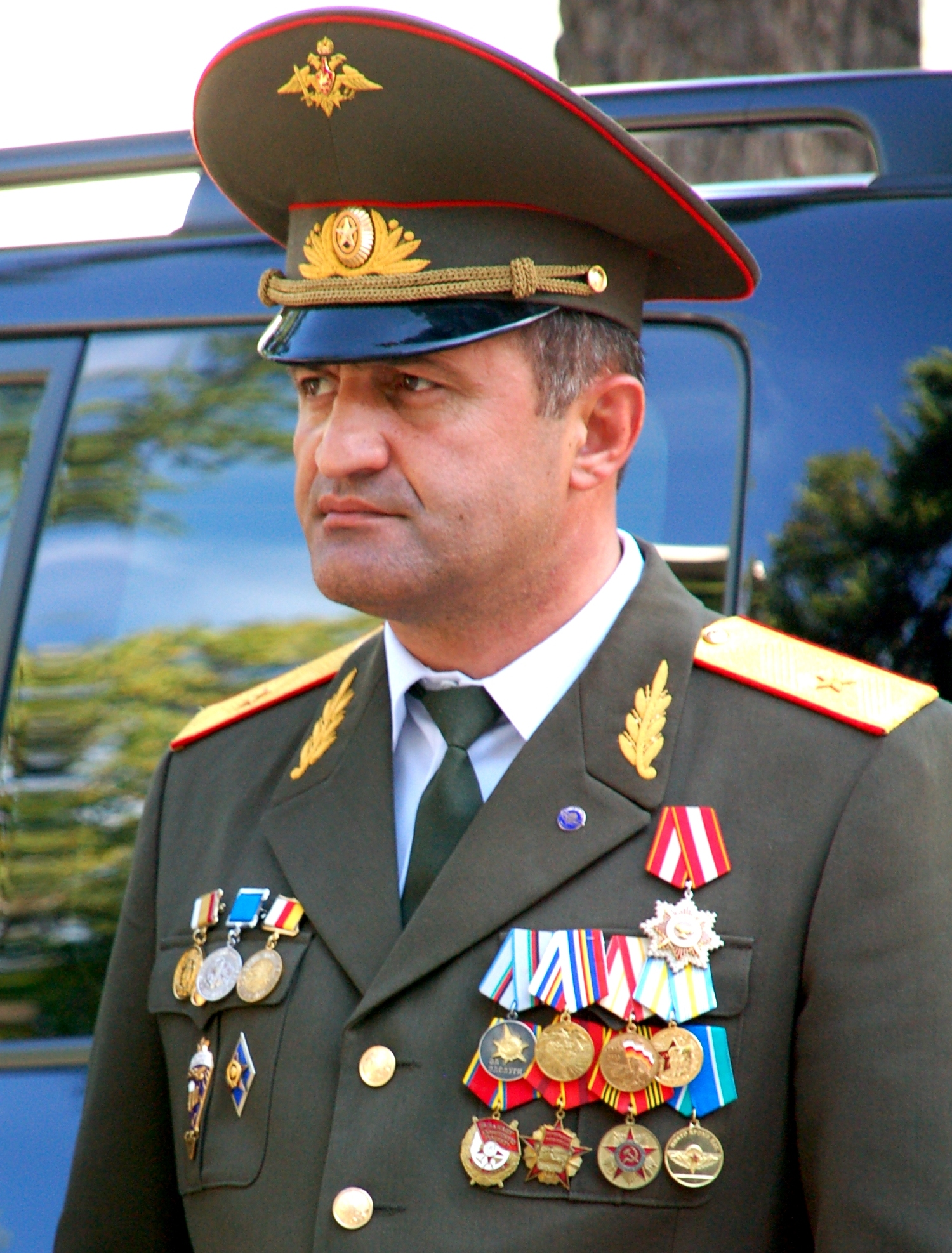 Анатолий Бибилов